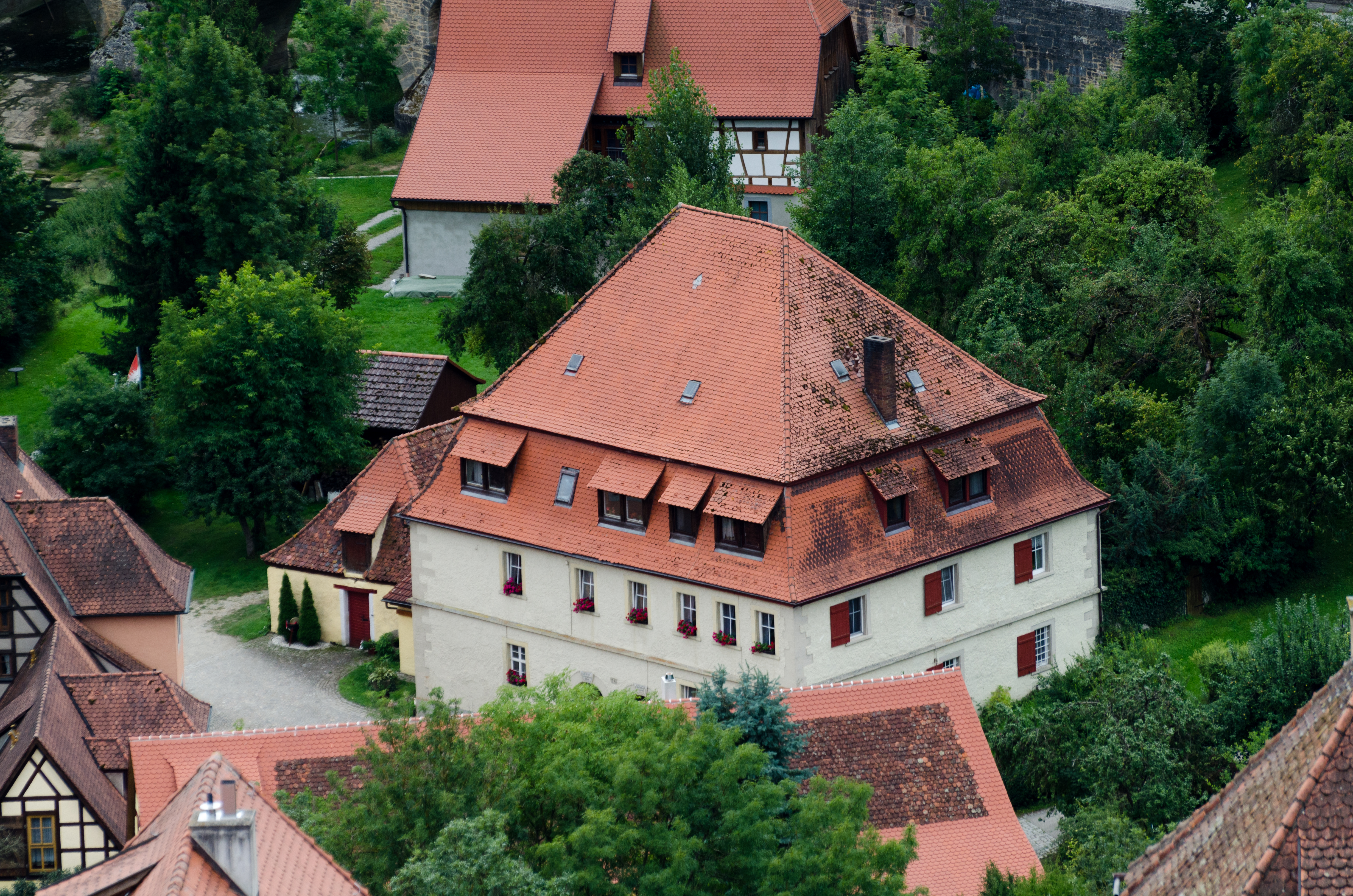 Rothenburg ob der Tauber, Herrenmühle